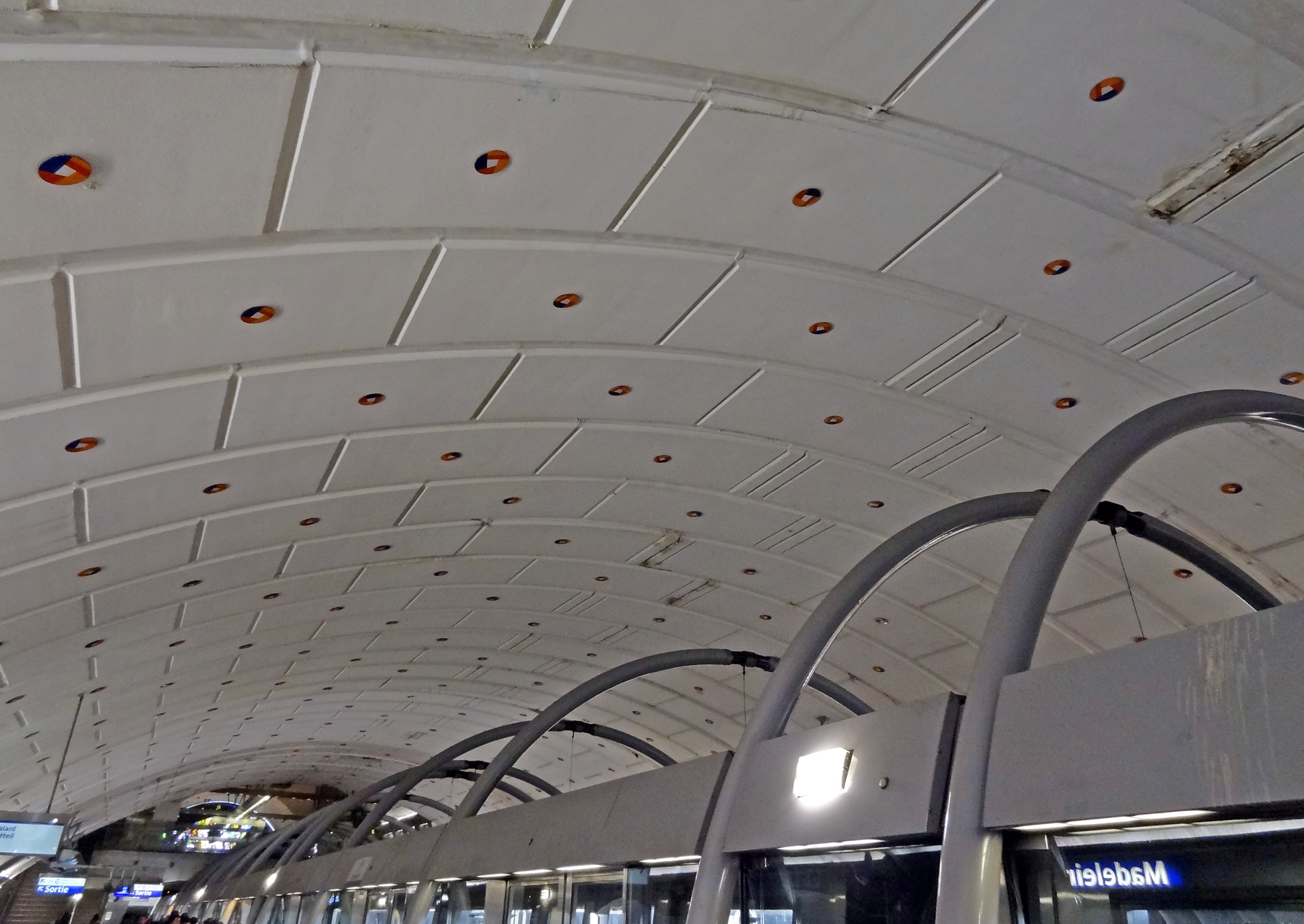 Station Madeleine de la ligne 14 du métro de Paris, France.